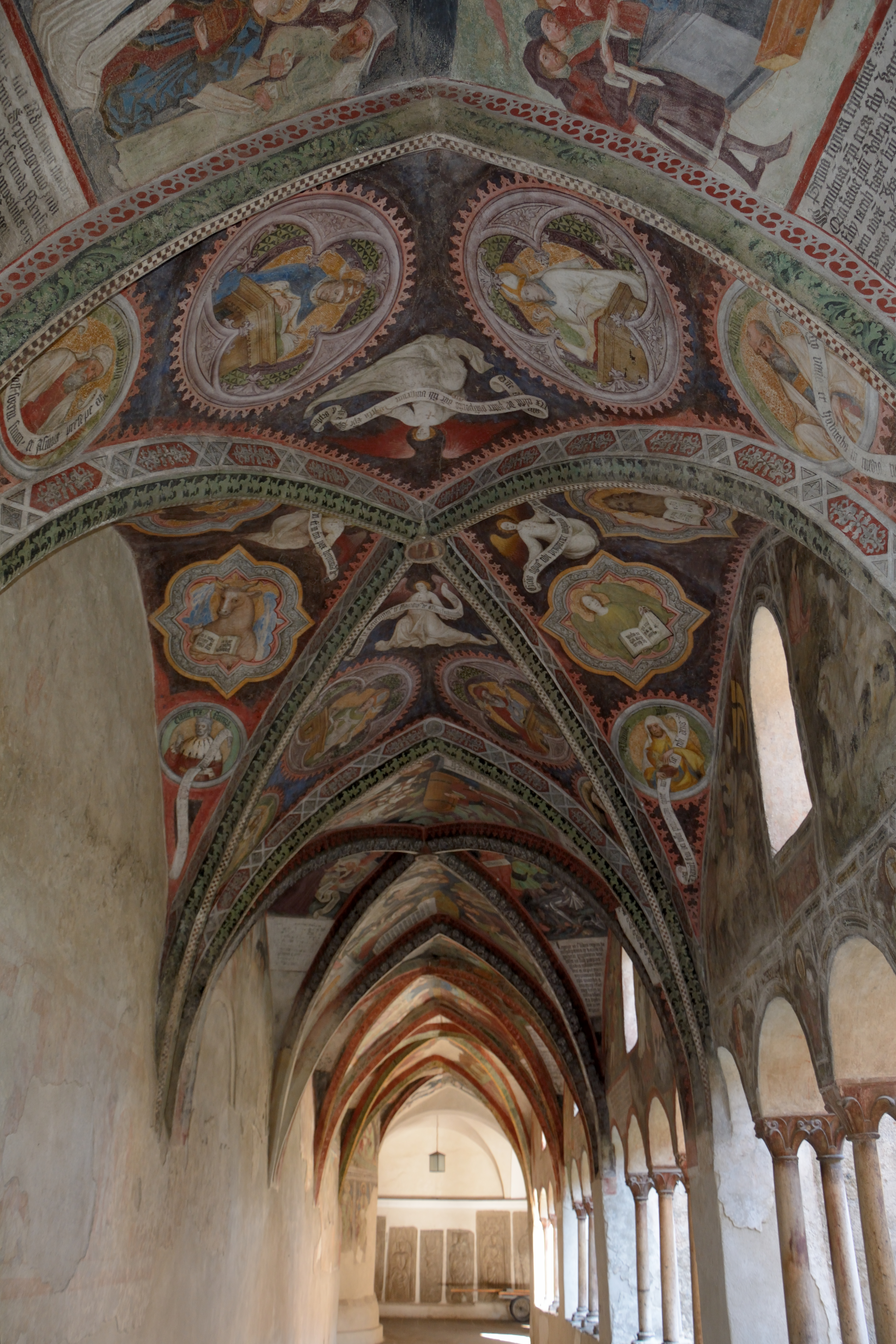 Kreuzgang des Brixner Domes, Westflügel. Im Vordergrund die 4. Arkade mit Fresken des Meisters Hans von Bruneck, entstanden 1417. Dahinter die Arkaden 5 bis 8.